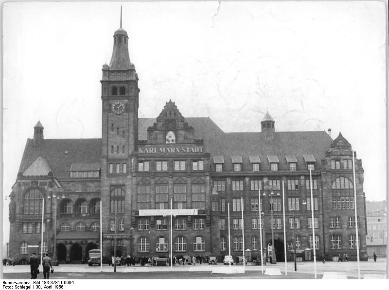 Chemnitz, Rathaus Zentralbild Schlegel 30.4.1956 Stadtansichten von Karl-Marx-Stadt Am 10. Mai 1956 werden die Teilnehmer an der Friedensfahrt Warschau-Berlin-Prag im Etappenort Karl-Marx-Stadt eintreffen. Dort wird auch der letzte Ruhetag für die "Giganten der Landstrasse" sein. UBz: Ein Blick auf das Karl-Marx-Städter Rathaus.